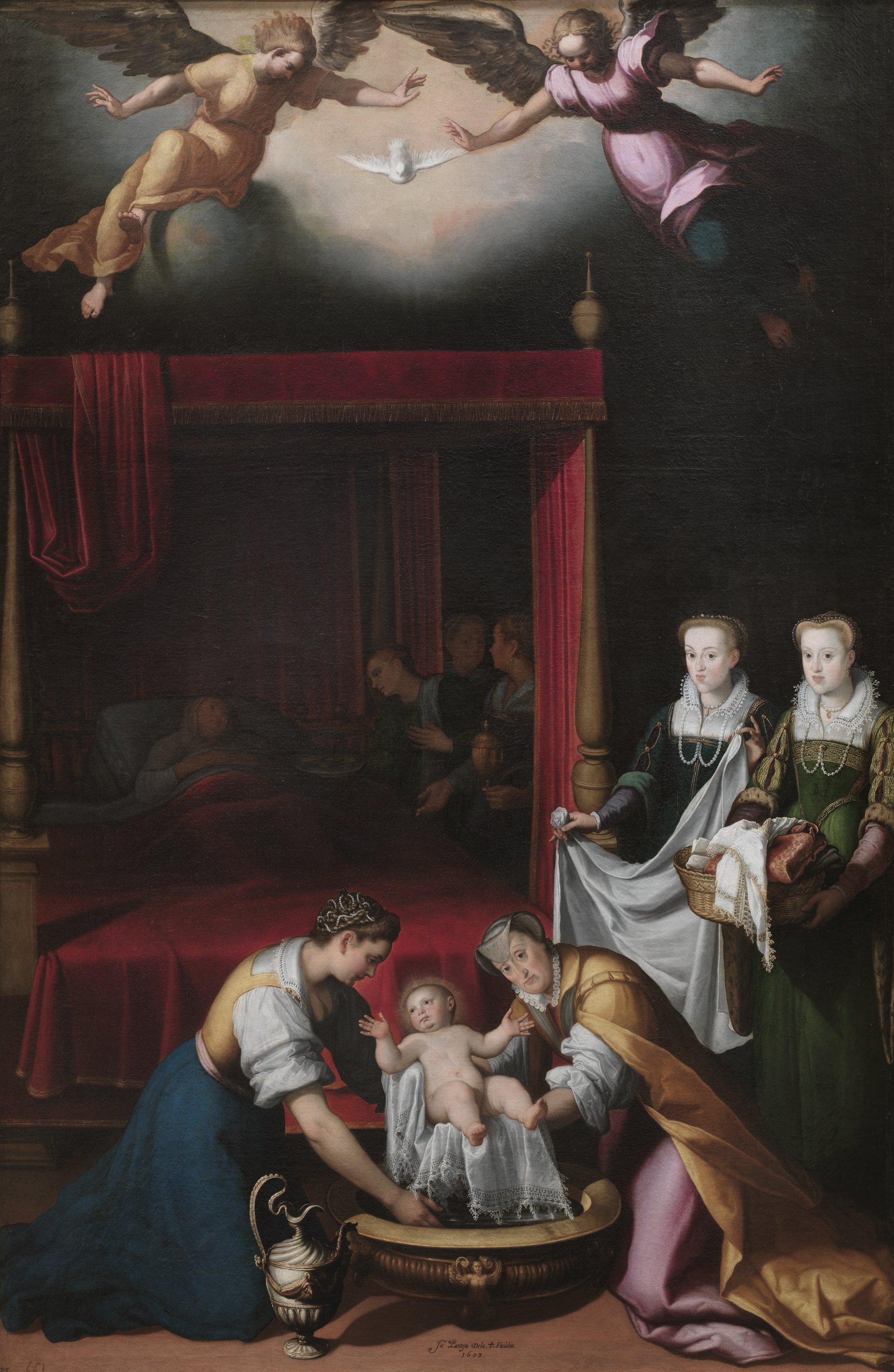 Se representa el Nacimiento de la Virgen con la madre y dos de las hermanas de la reina doña Margarita de Austria. doña María de Baviera arrodillada sosteniene a la Virgen, tras ella doña Leonora con el lienzo y doña Catalina Renata o doña Maria Cistierna con una canastilla, al fondo, Santa Ana es atendida por unas damas. Obra firmada y fechada “Jnº Pantoja De la + Faciebat / 1603”, fue encargada junto con su pareja, el Nacimiento de Cristo (P1039), por la reina doña Margarita de Austria, cuya piedad y devoción mariana eran sobradamente conocidos, para su oratorio privado en el Palacio de Valladolid.